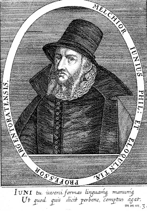 Melchior Junius, (1545-1604), Humanist, Rhetoriker, Politikwissenschaftler